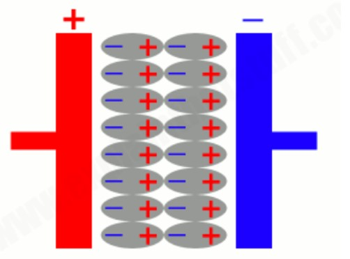 עקרון הפעולה של קבל רגיל